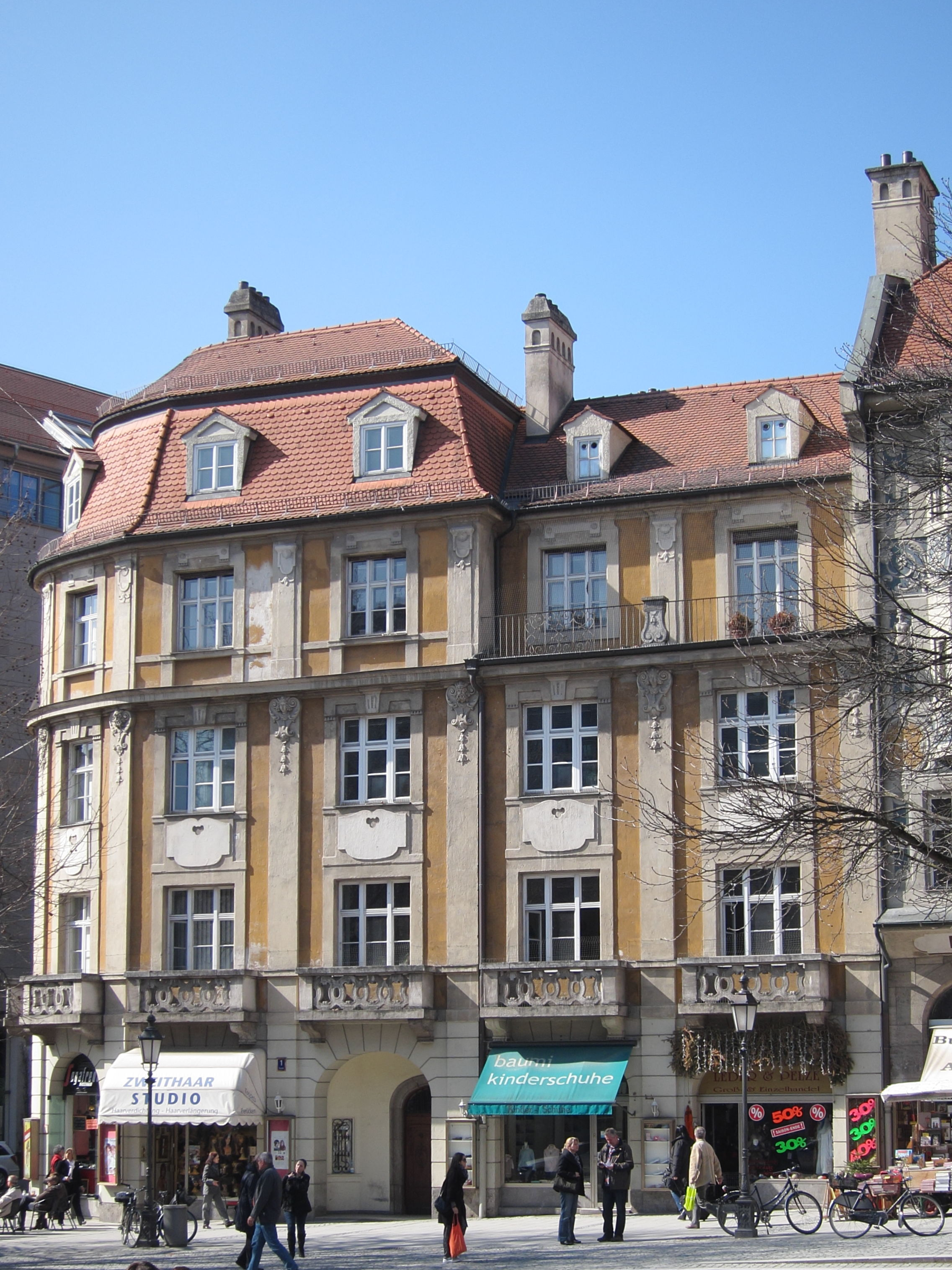 Rosental 1; Ruffini-Block, dreiseitige Wohn- und Geschäftshausgruppe in malerischen barockisierenden Formen mit reich stuckierten, mehrfarbigen Fassaden, 1903-05 von Gabriel von Seidl. This is a photograph of an architectural monument.